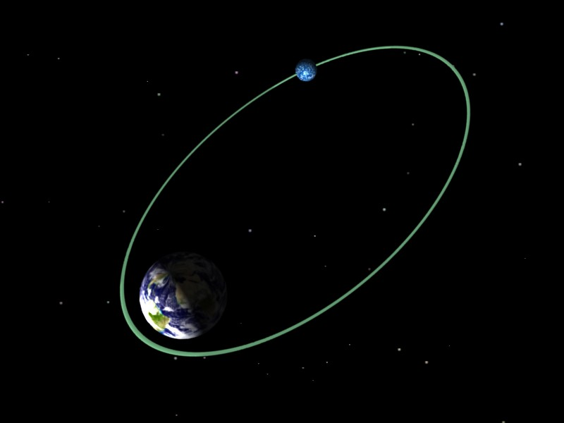 Геоцентрическая орбита